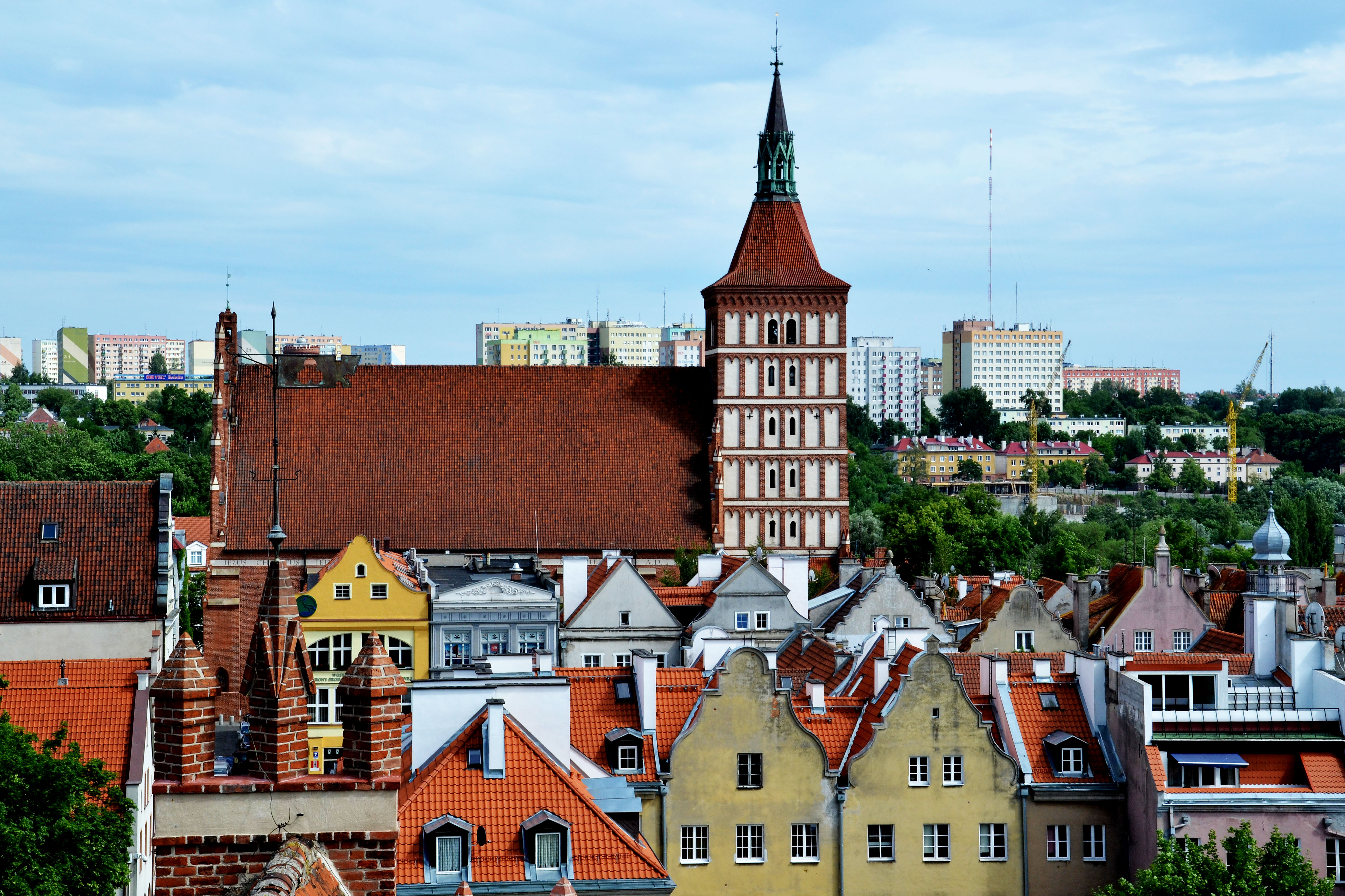 Olsztyn. Bazylika konkatedralna św. Jakuba (Bazylika Mniejsza)